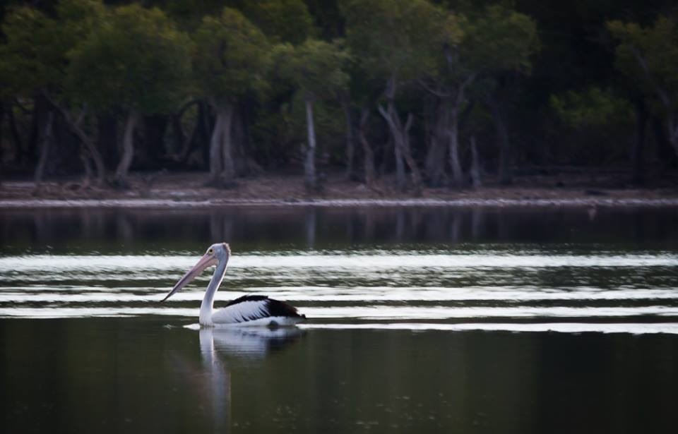 Maubarasee